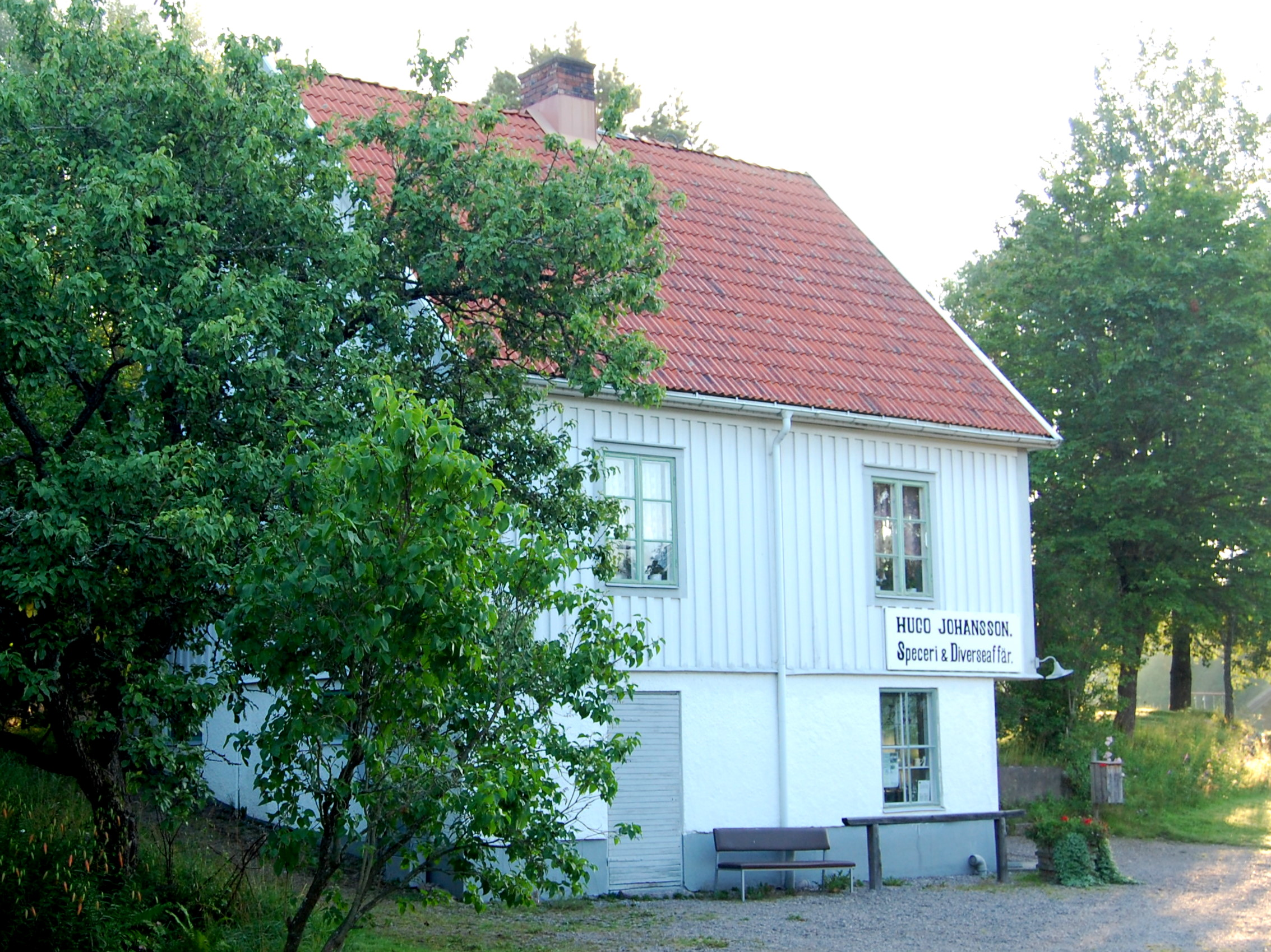 Affären, Komstad, Sävsjö kommun